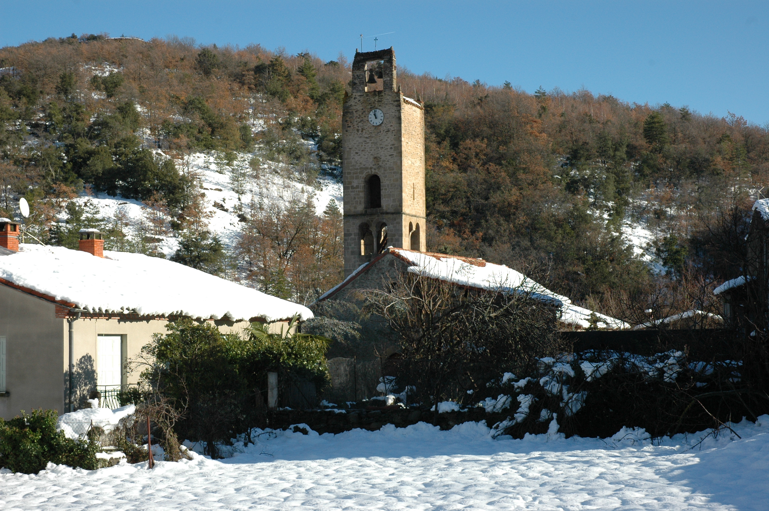 Sant Fructuós de Taurinyà